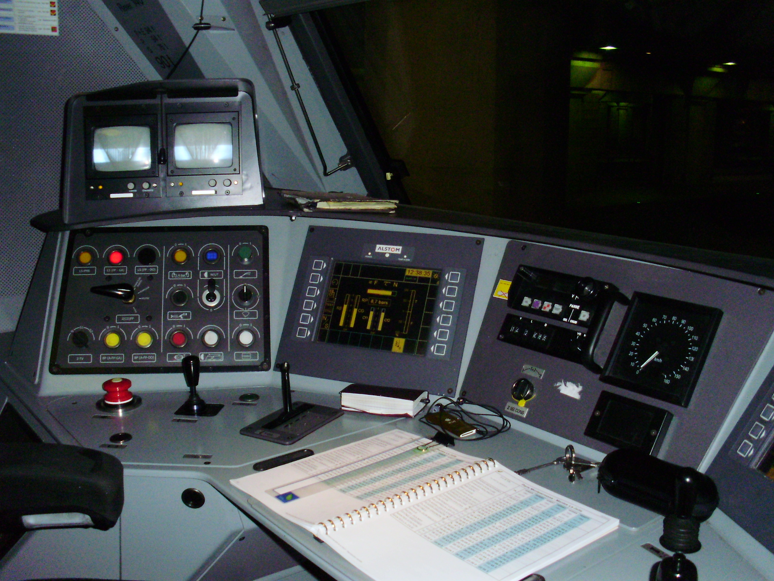 Poste de conduite d'une locomotive BB 27300 (ici, la BB 27310 à Paris-Montparnasse) - Vue à gauche du siège du conducteur